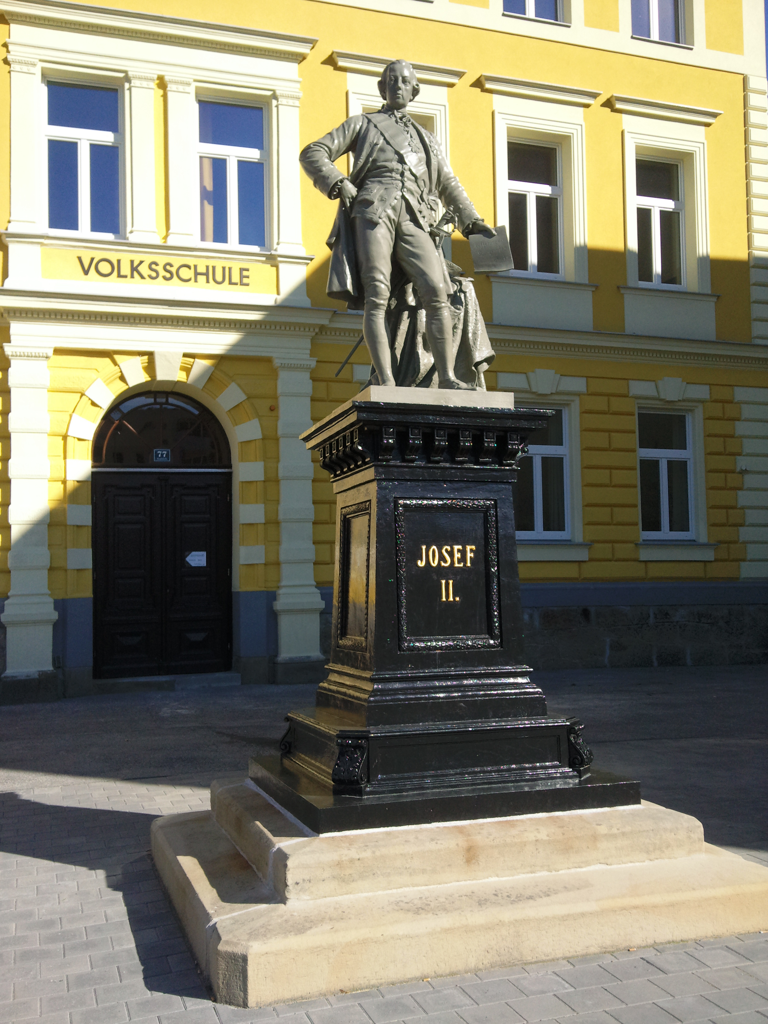 Denkmal von Kaiser Joseph II. (böhmischer Massenguss) am Hauptplatz in Pressbaum